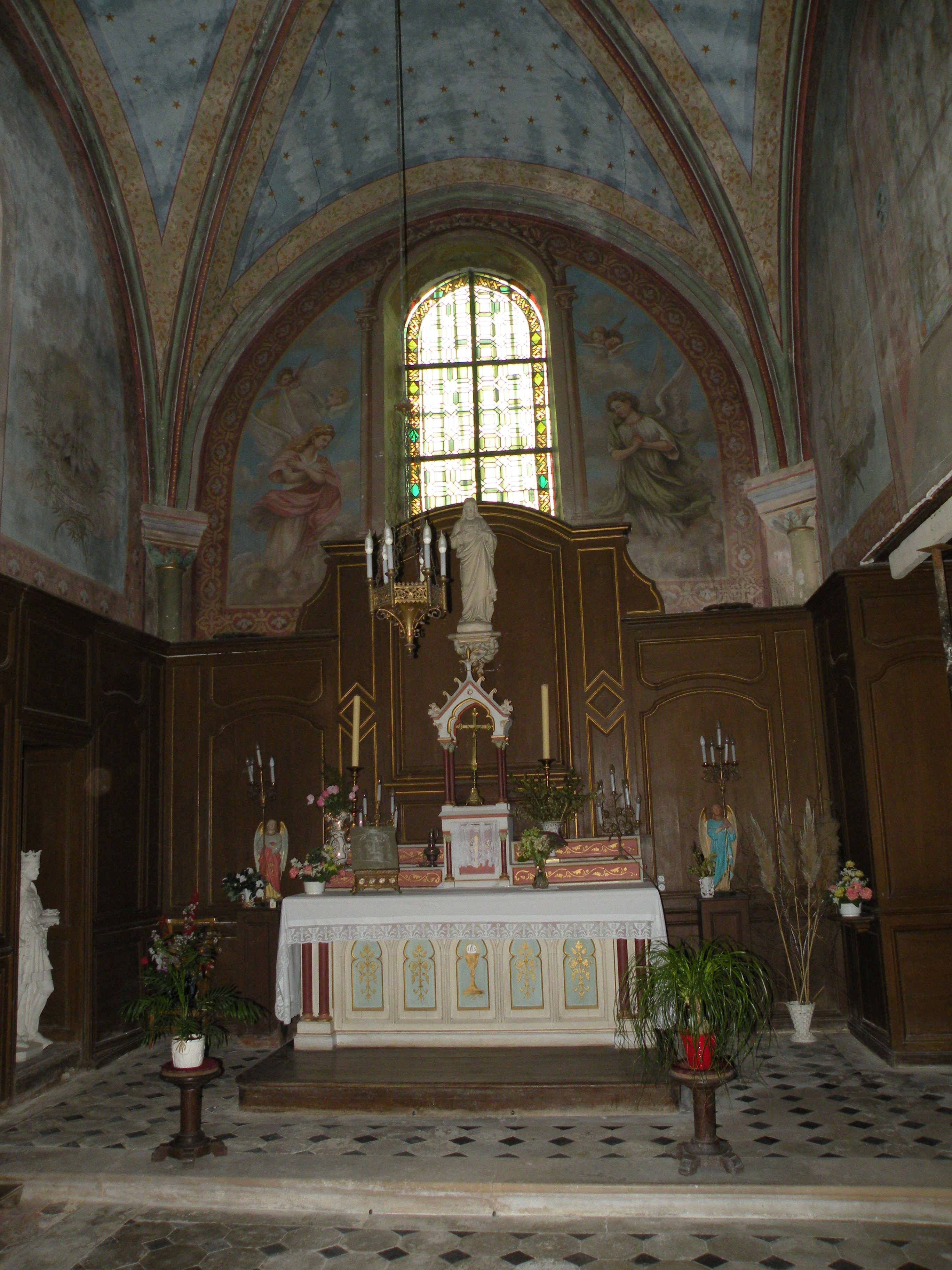 choeur de l'église Saint-Martin de Vallangoujard choeur